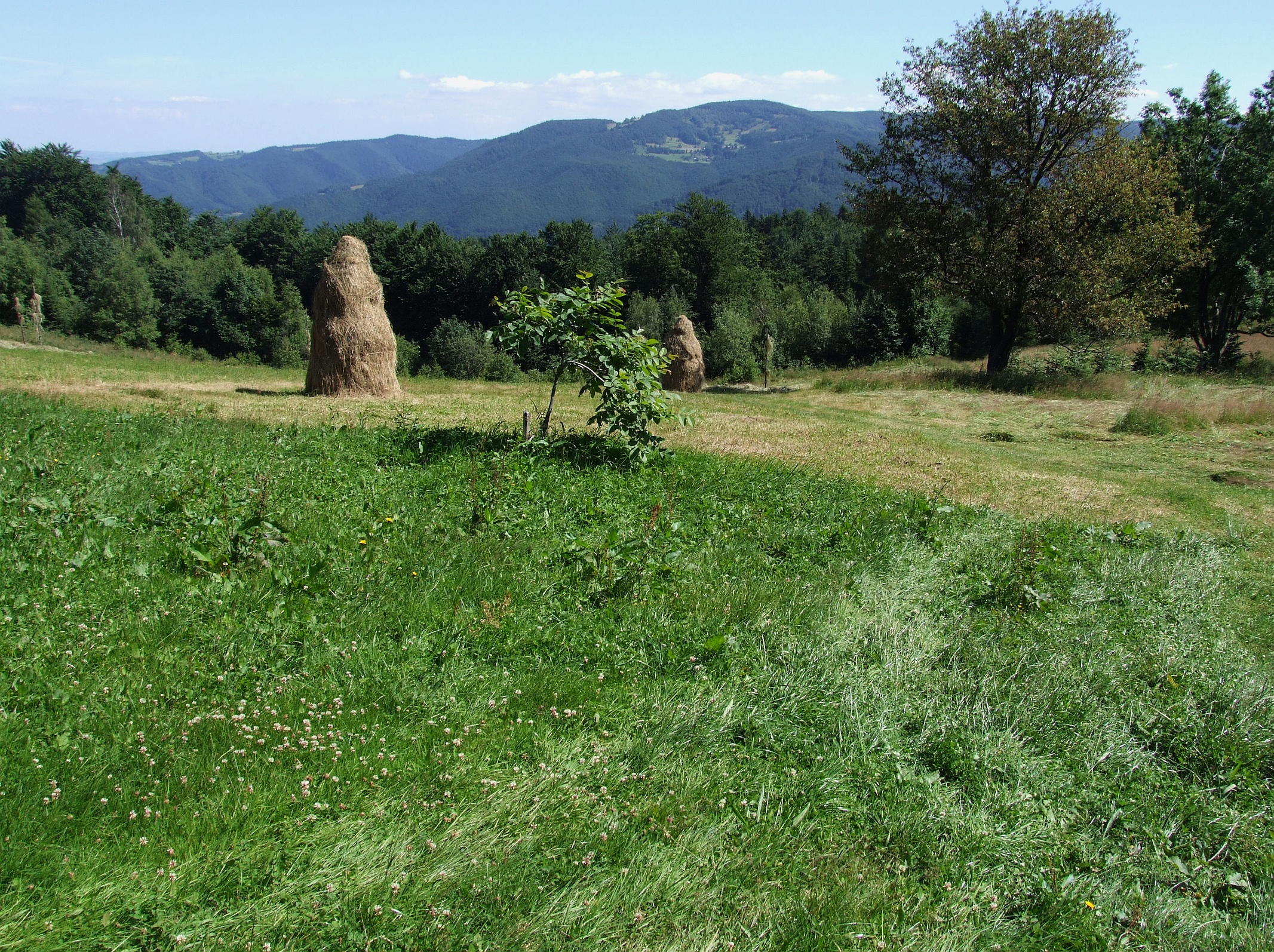 Widok na Pasmo Jaworzyny spod Kordowca w Paśmie Radziejowewej